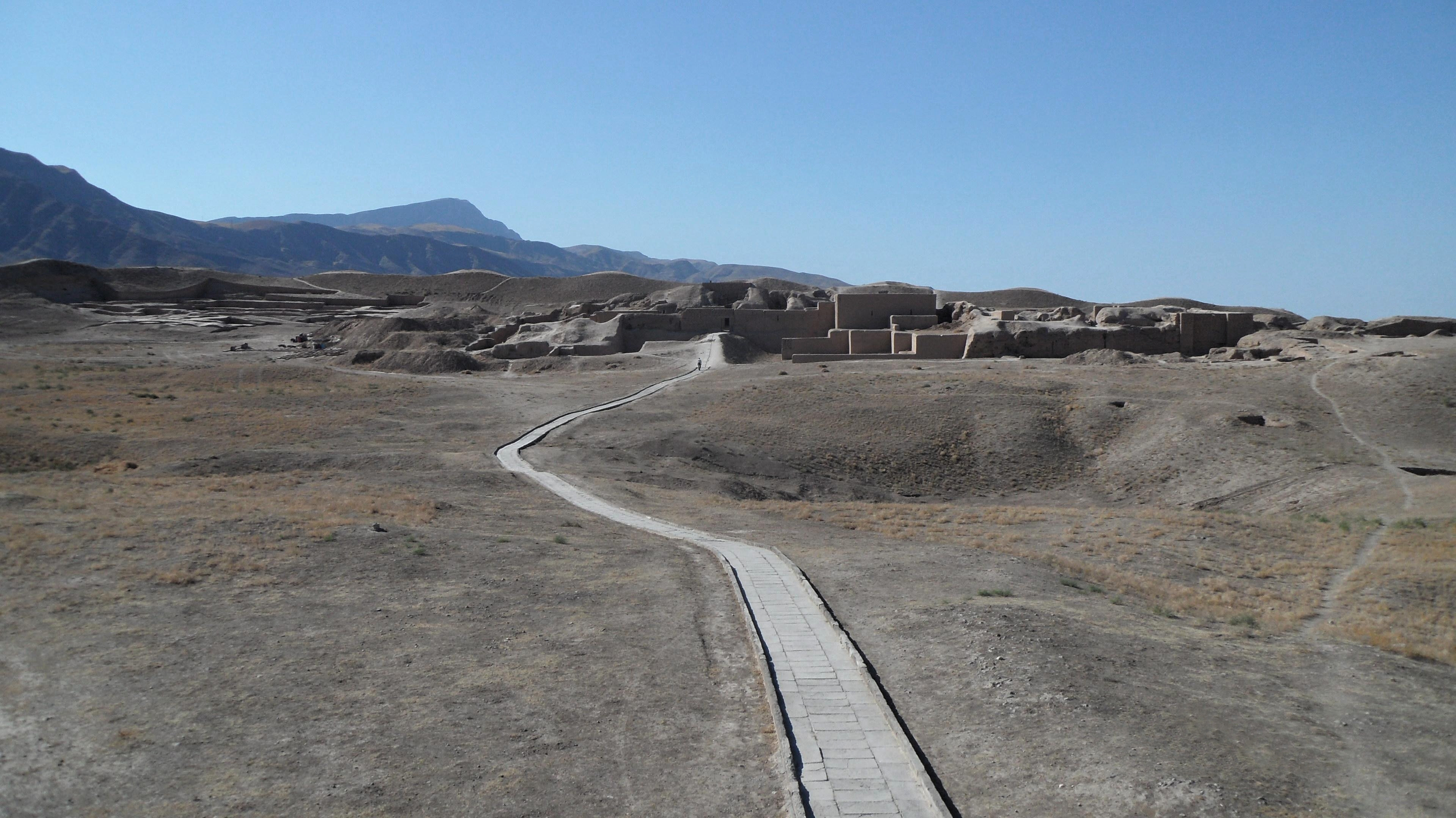 Gesamtansicht Grabungshügel von Nisa (Parther)